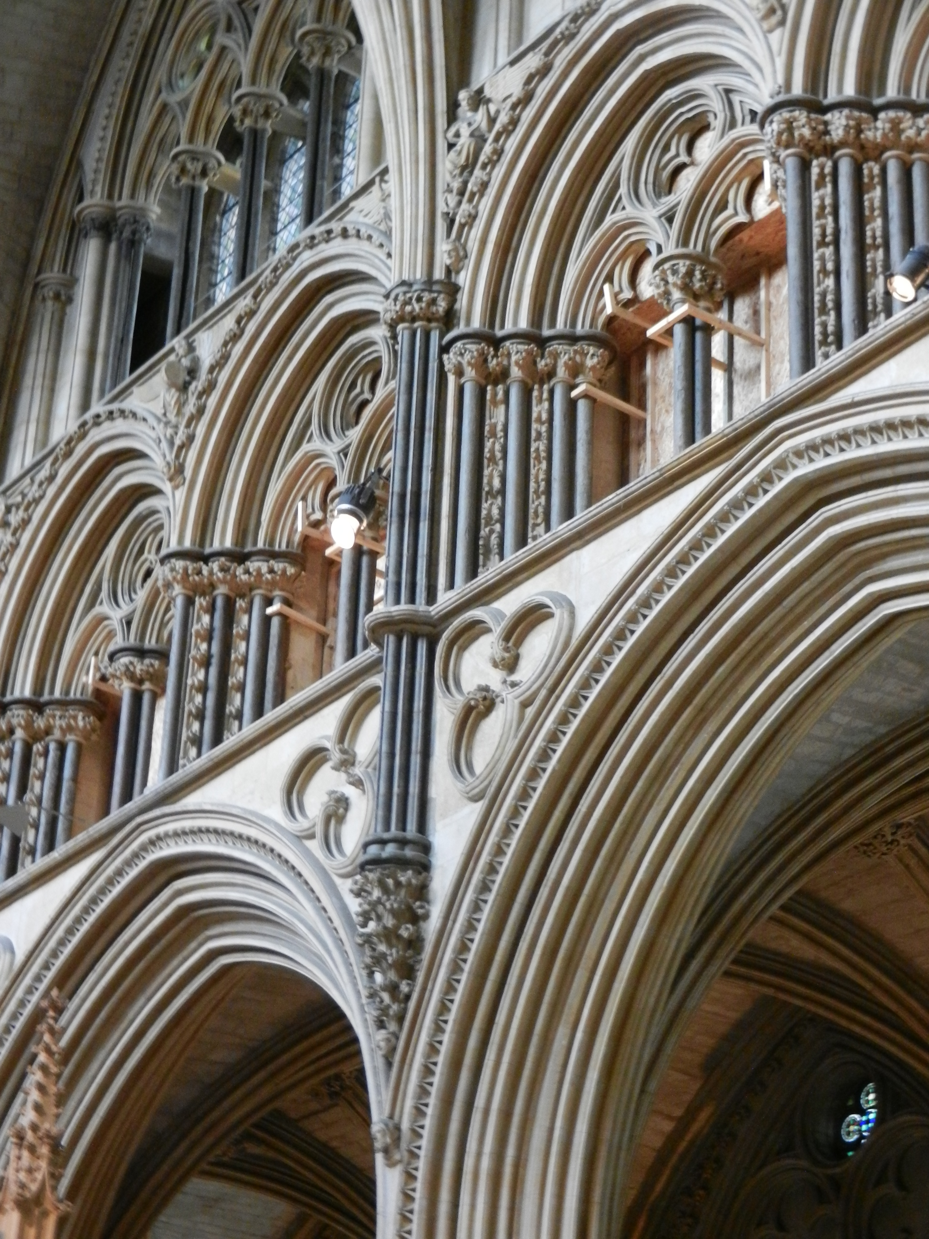 Katedrala v Lincolnu, Anglija, detajl triforija.